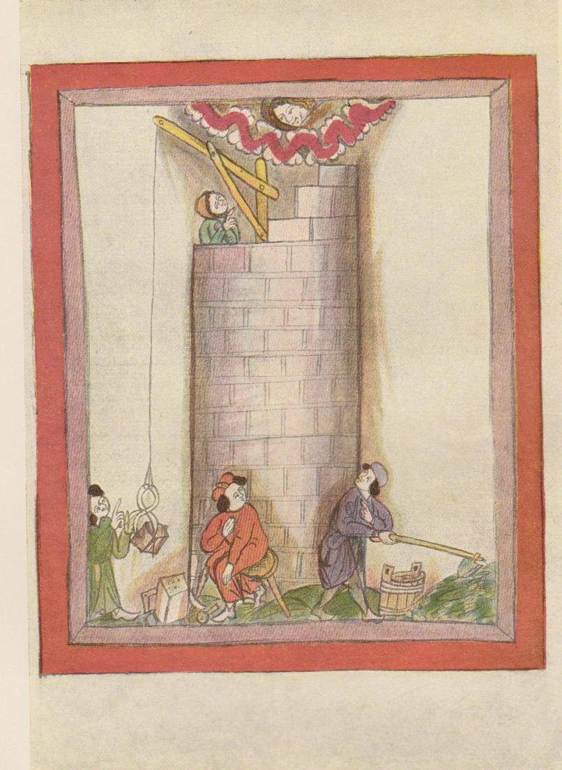 Szene aus der Weltchronik des Jan Enenkel (Jans der Enikel); Turmbau zu Babel